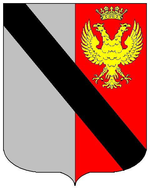 Grb obitelji Kambi